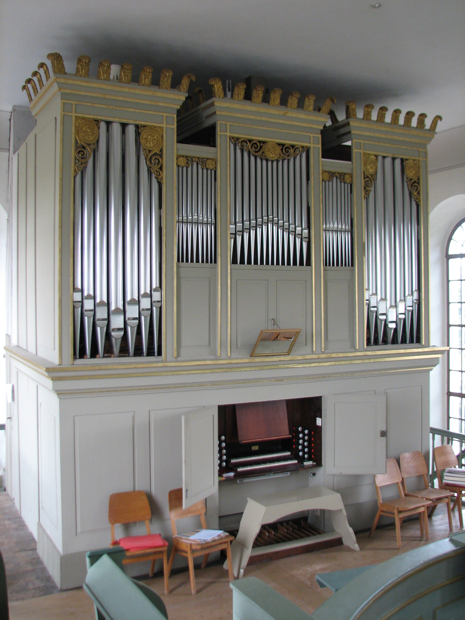 Orgel (Gesamtansicht)